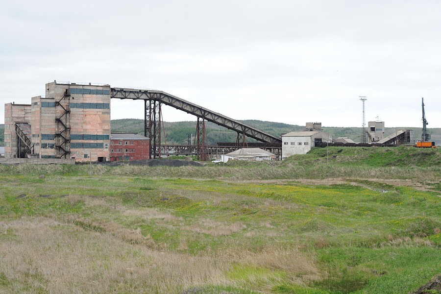 Zentralnaja obogatitelnaja Fabrika in Schachtjorsk